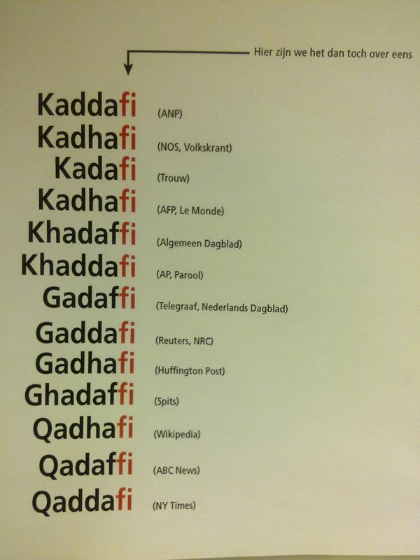 Bord aan de muur van de ANP-redactie in Den Haag.